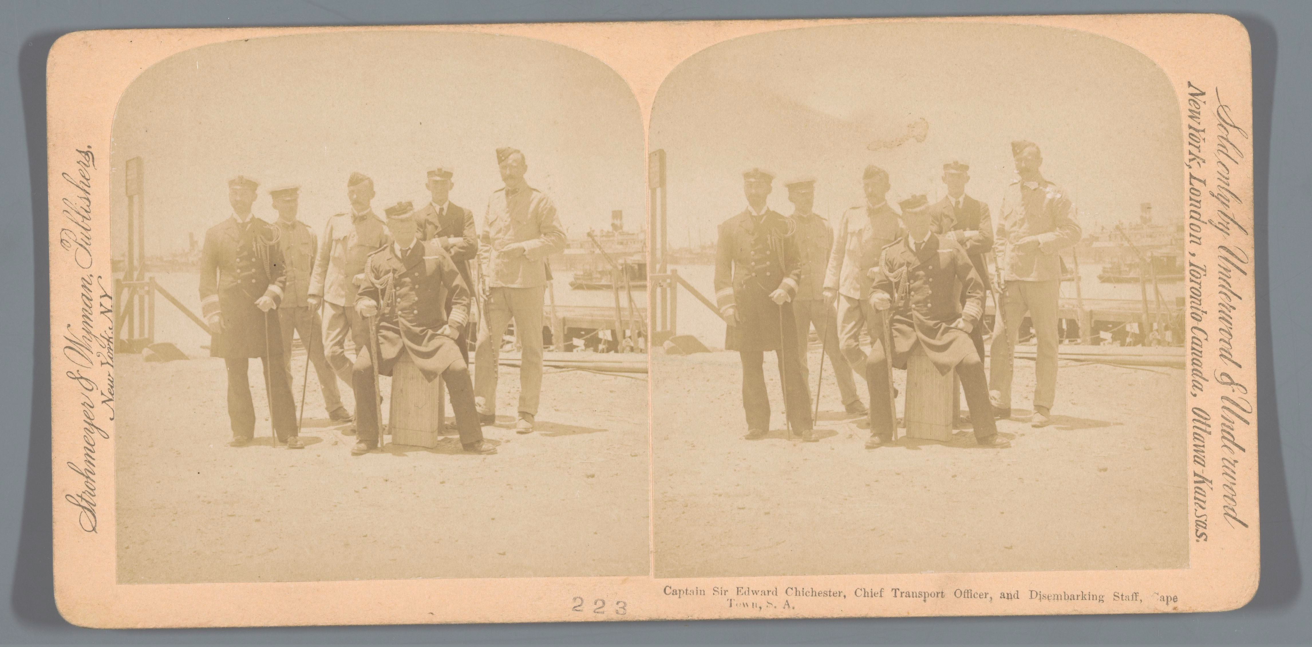 IdentificatieTitel(s): Portret van Edward Chichester en vijf onbekende mannen op een kade in KaapstadCaptain Sir Edward Chichester, Chief Transport Officer, and Disembarking Staff, Cape Town, S.A. (titel op object)Objecttype: stereofoto Objectnummer: RP-F-F09117Opschriften / Merken: nummer, recto, gedrukt: ‘223’VervaardigingVervaardiger: fotograaf: Underwood and Underwood (vermeld op object)verkoper: Underwood and Underwooduitgever: Strohmeyer & Wyman (vermeld op object)Plaats vervaardiging: fotograaf: Kaapstaduitgever: New YorkDatering: ca. 1900 - ca. 1905Materiaal: fotopapier karton Techniek: albuminedrukAfmetingen: secundaire drager: h 88 mm × b 178 mmOnderwerpWat: commander-in-chief, admiralWaar: KaapstadWie: Edward ChichesterVerwerving en rechtenVerwerving: overdracht van beheer 1994Copyright: Publiek domein